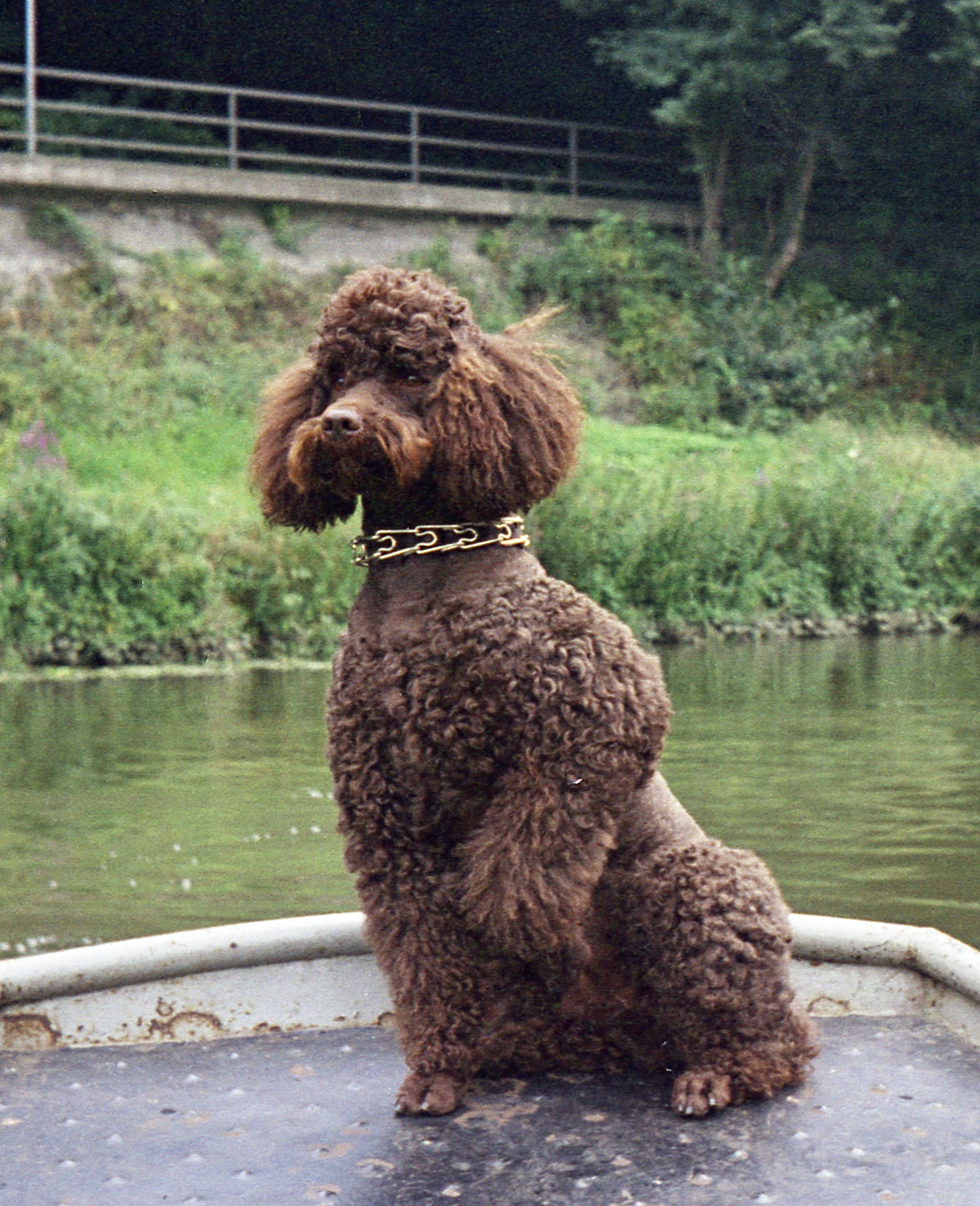 Königspudel auf dem Boot